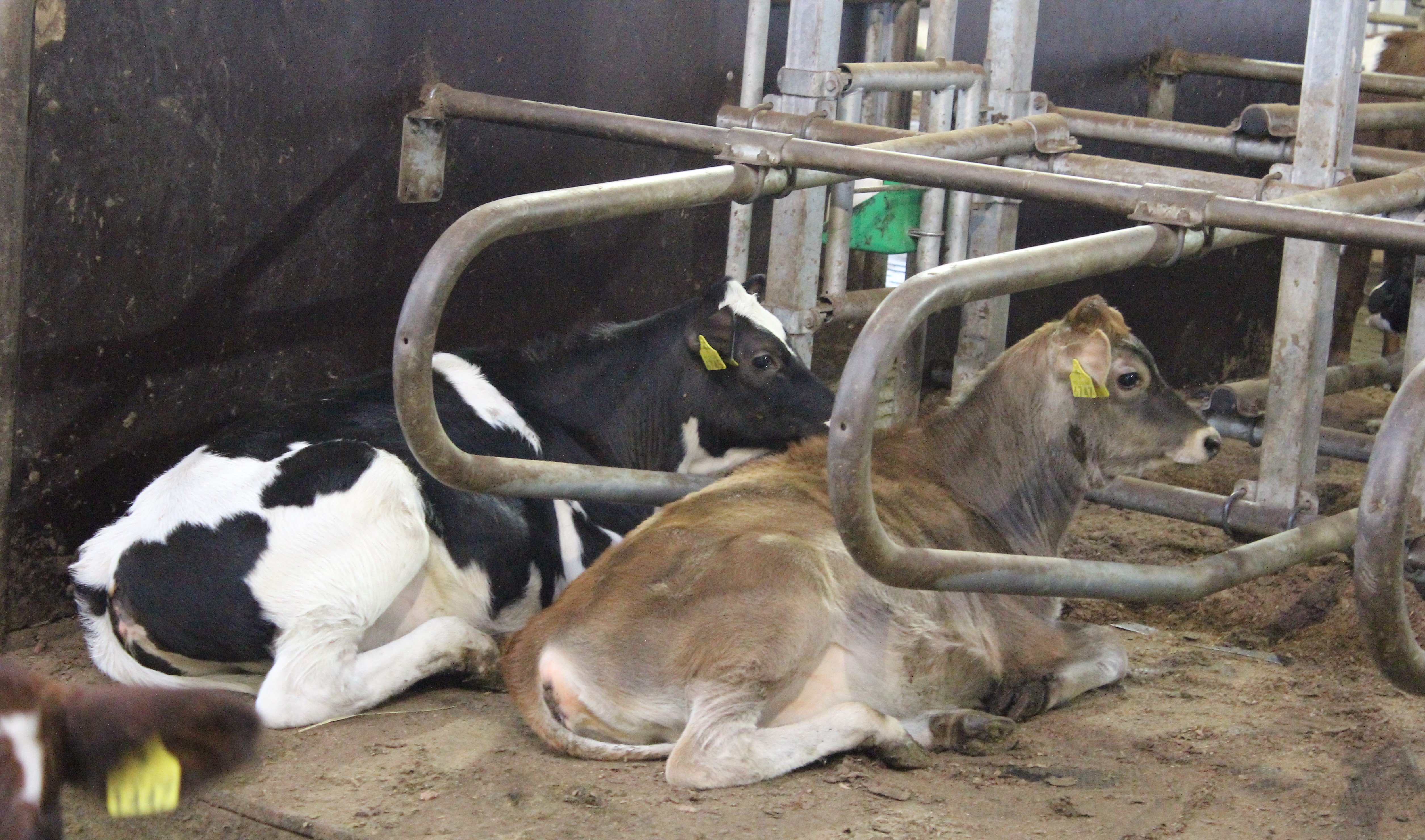 Nuorikoita makaamassa parressa pihatossa